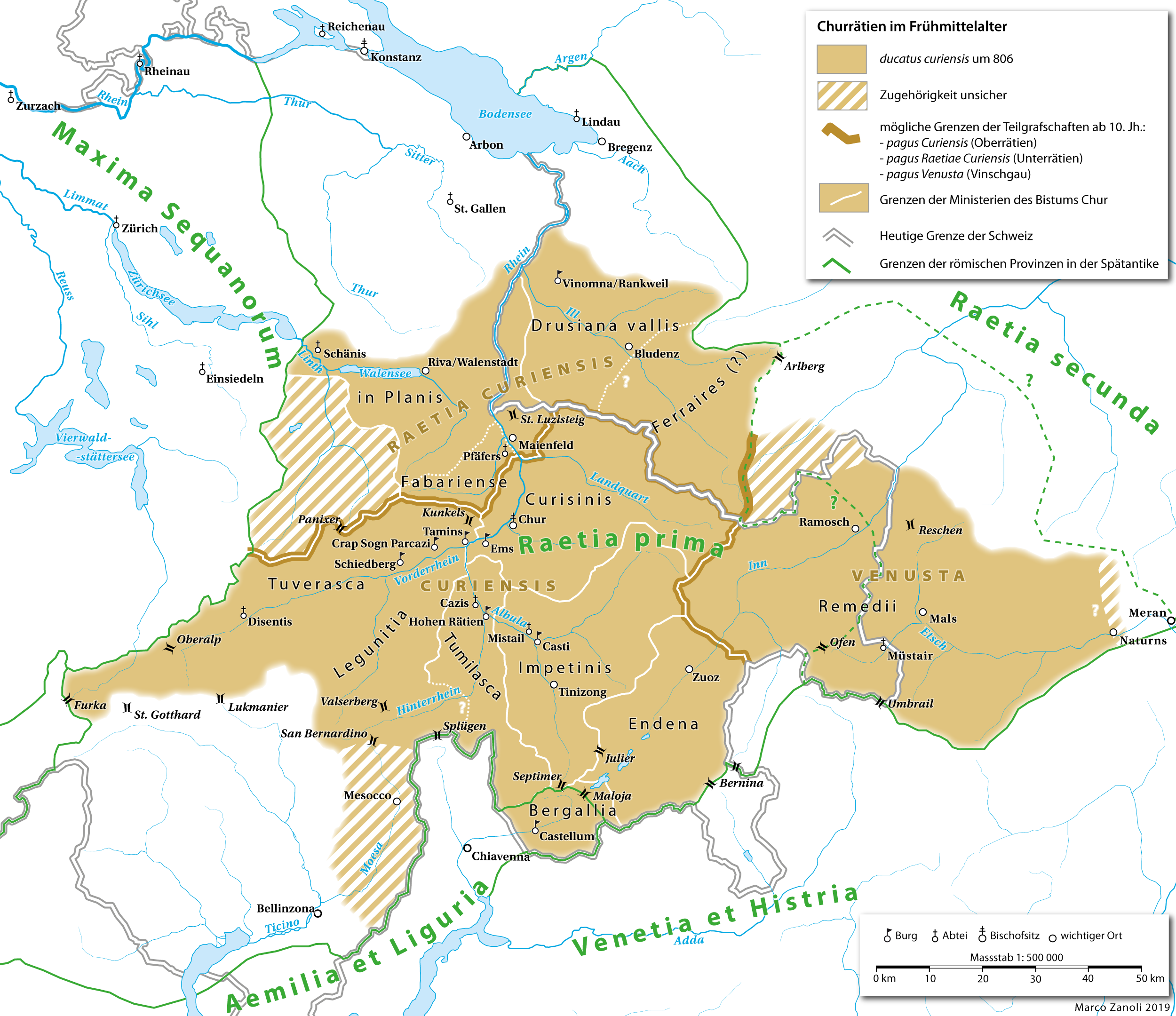 Churrätien im Frühmittelalter zwischen 9. und 11. Jahrhundert